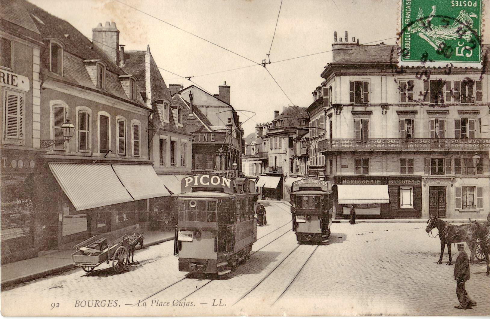 Carte postale ancienne éditée par LL, n°92 : Bourges - La place CujasVue d'un croisement de motrice du tramway de Bourges